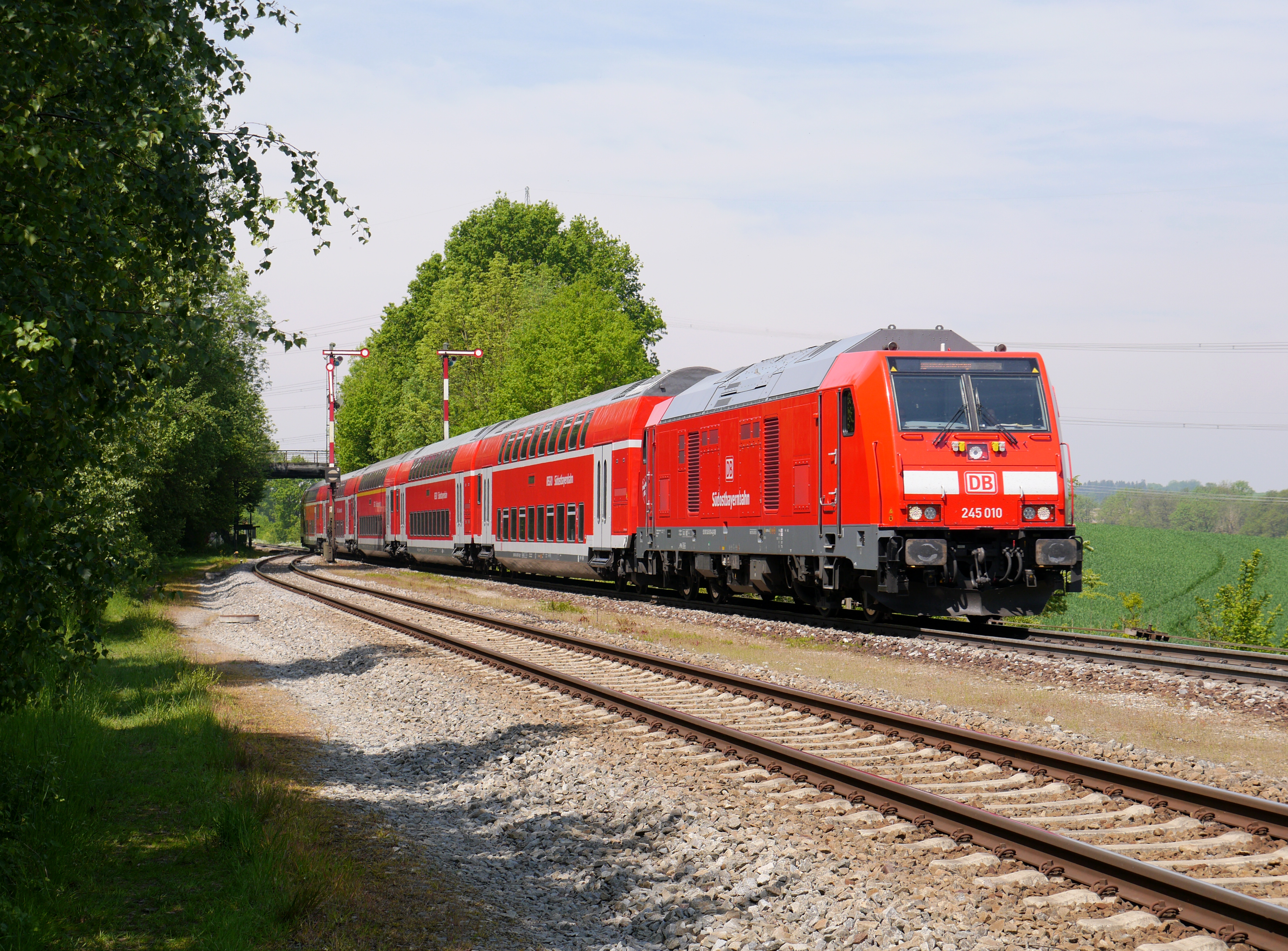 Diesellokomotive 245 010 der Südostbayernbahn mit fünf Doppelstockwagen als RB 27027 München Hbf–Mühldorf bei der Einfahrt in den Bahnhof Thann-Matzbach. Im Hintergrund die Ausfahrsignale in Richtung Hörlkofen und die Feldwegbrücke bei Thann.